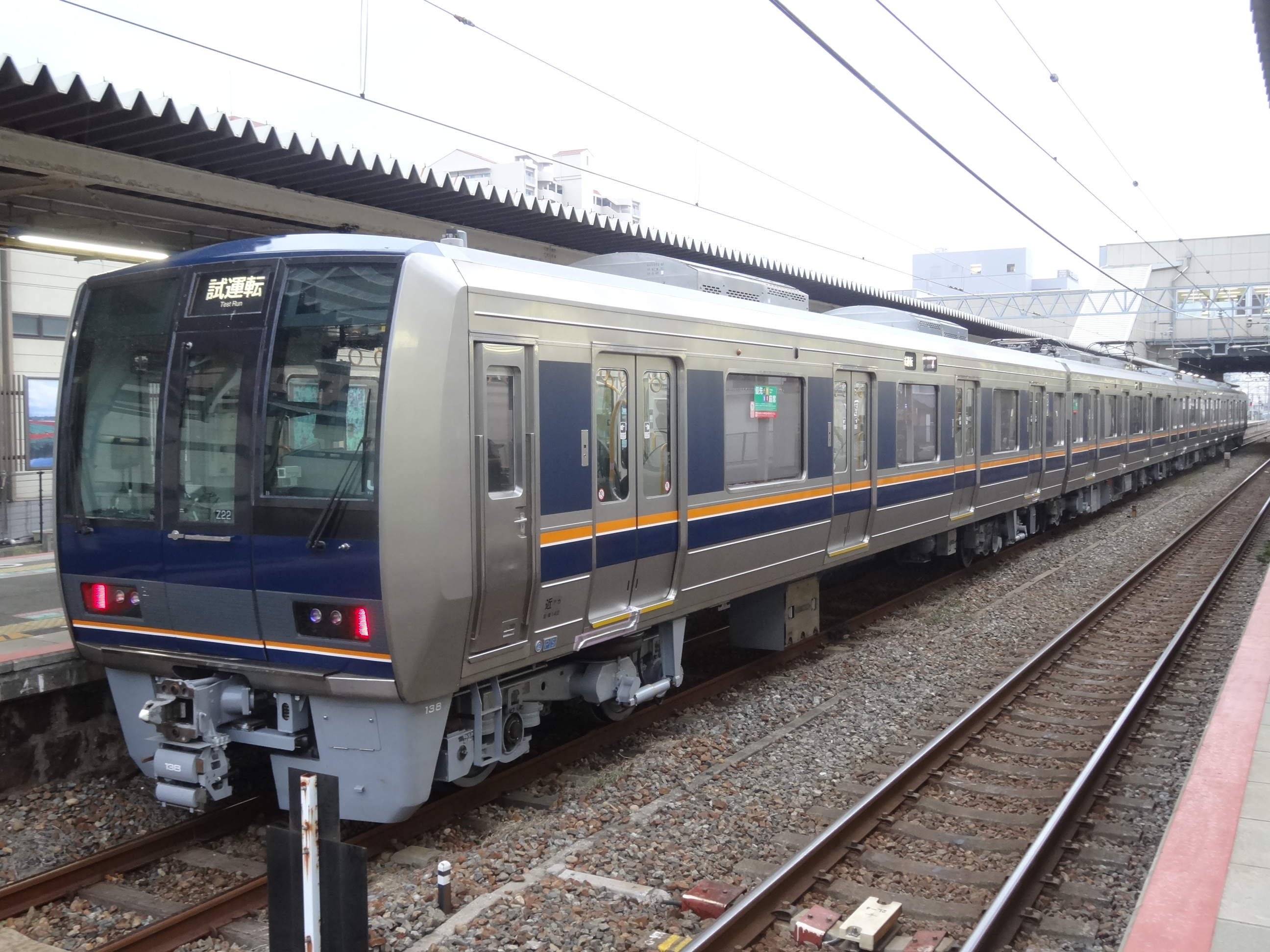 転落防止幌は設置されていない。 ライトはHID。